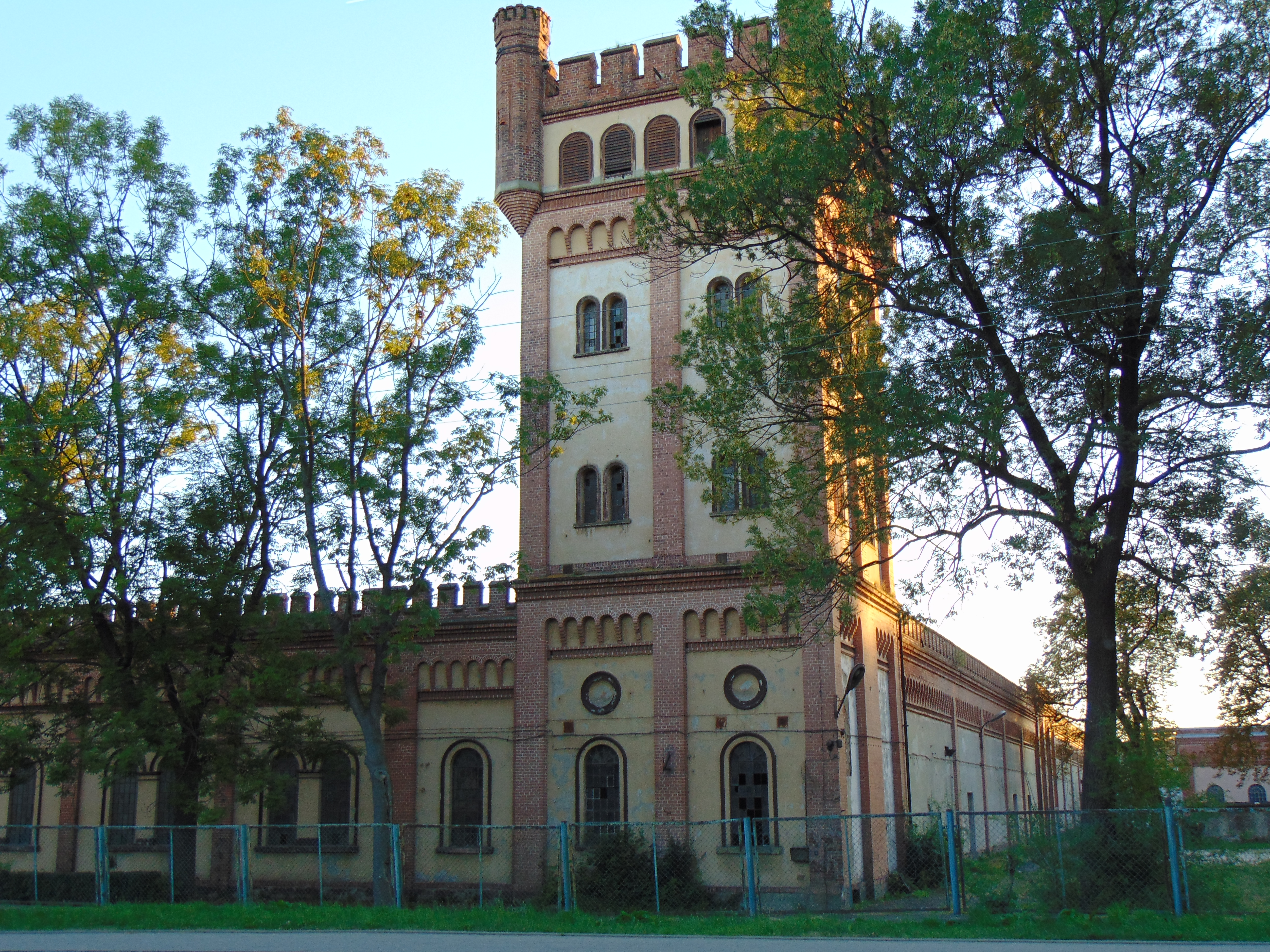 Obiekty poprzemysłowe. Budynki fabryki tesktylnej z XIX wieku. Po roku 1945 fabryka znana była pod nazwą ZPB "Frotex" w Prudniku.